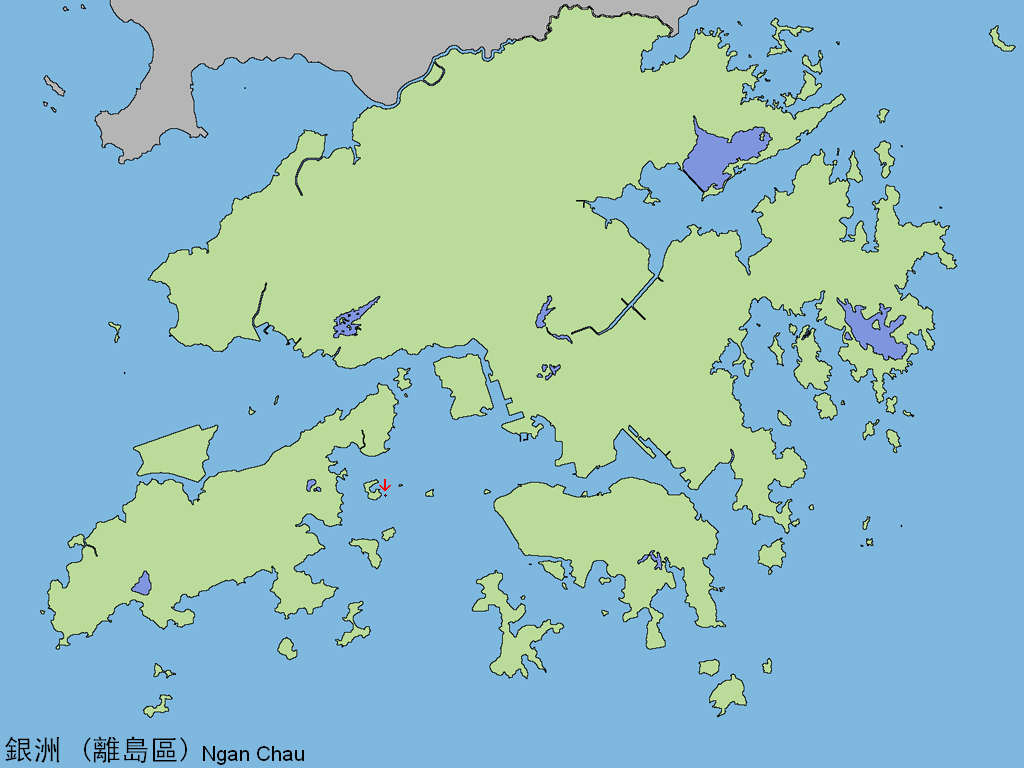 中文（香港）: 銀洲。